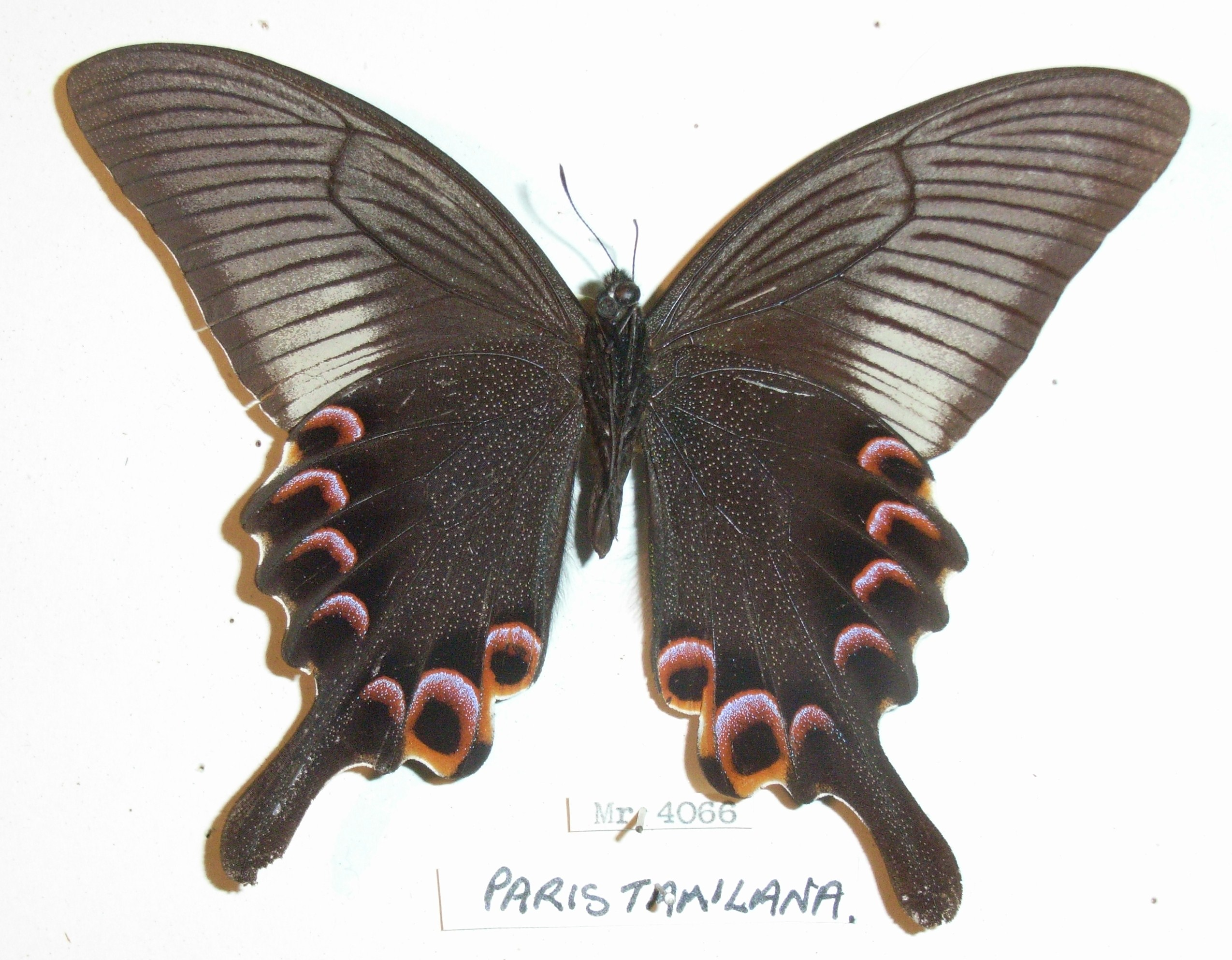 Papilio arcturus underside